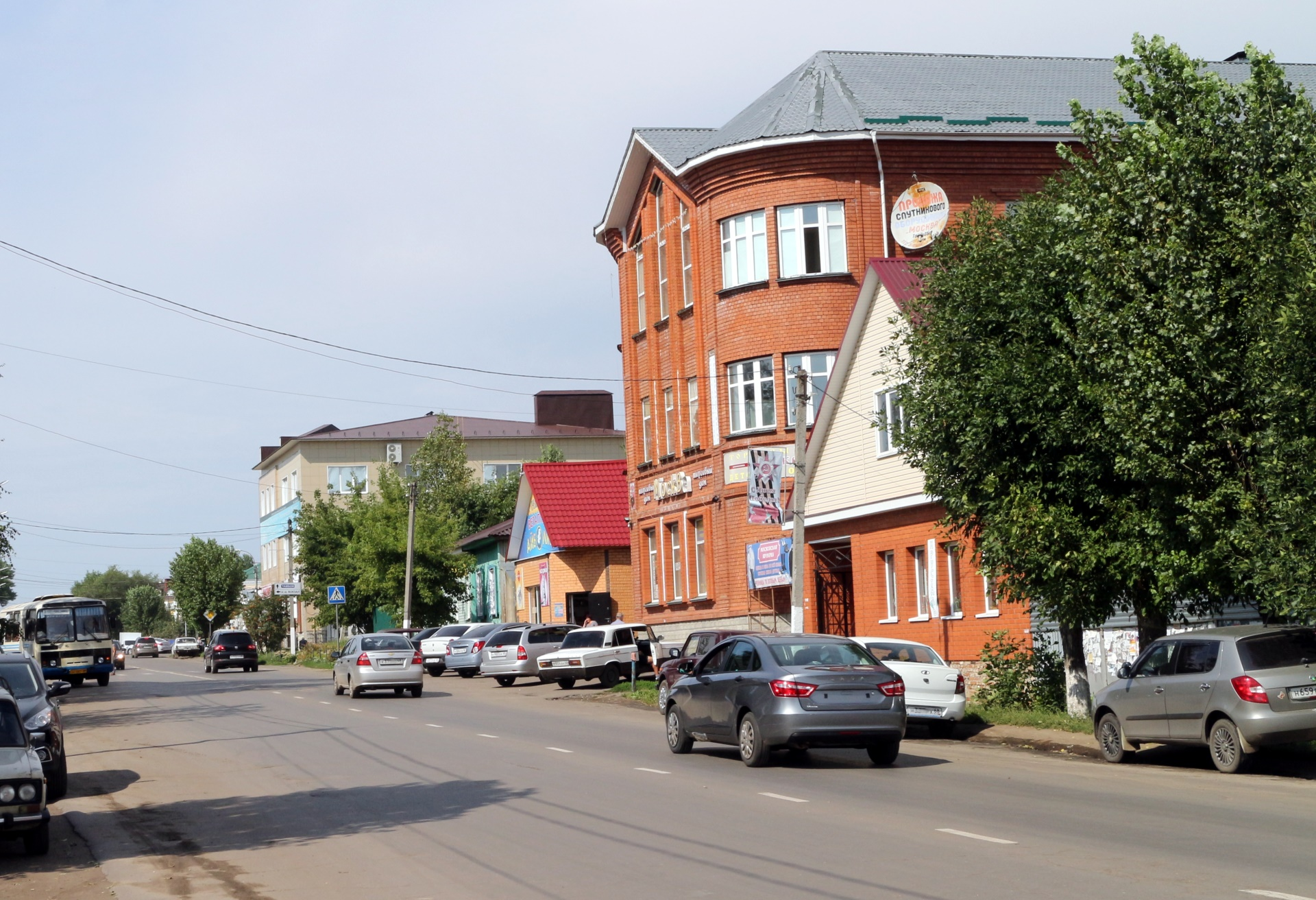 Кирсанов, одна из основных улиц (август 2016г).